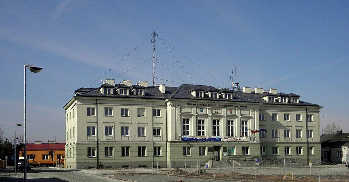 Siedziba Urzędu Miasta i Gminy oraz Starostwa Powiatowego.